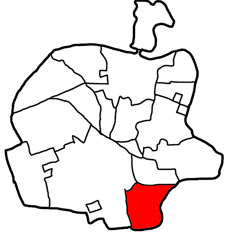 În această imagine este Făgărașul împărțit în cartiere. Cartierul în roșu este Colonia Combinat.